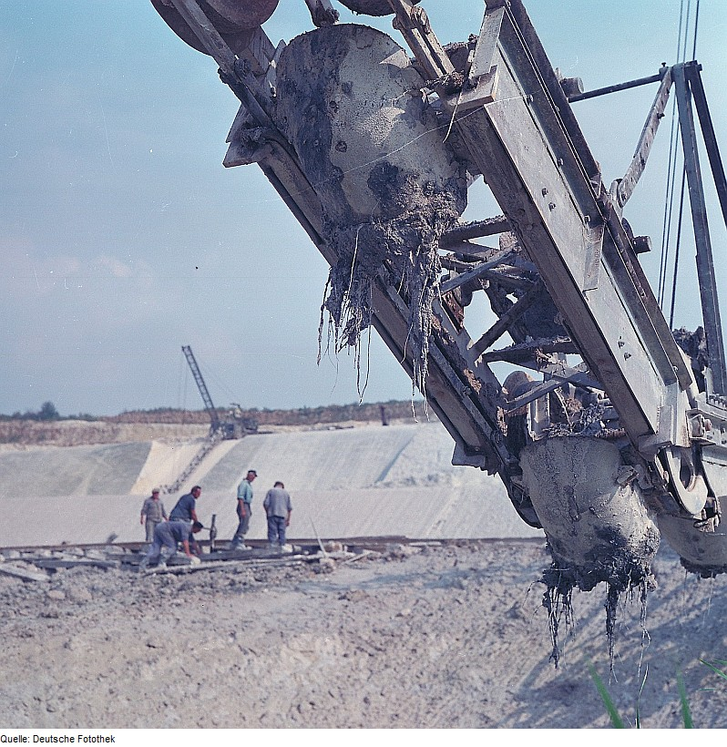 Original image description from the Deutsche Fotothek Facharbeiter für Glastechnik